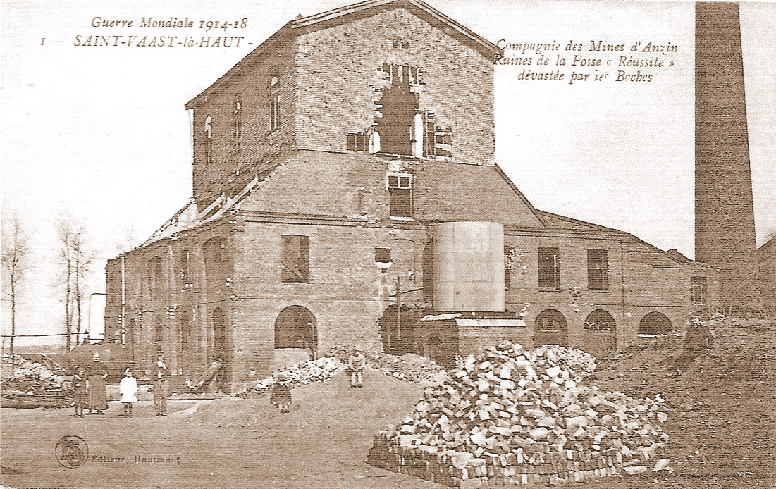 Ancienne fosse Réussite de Saint Waast les Valenciennes fermée en 1893.